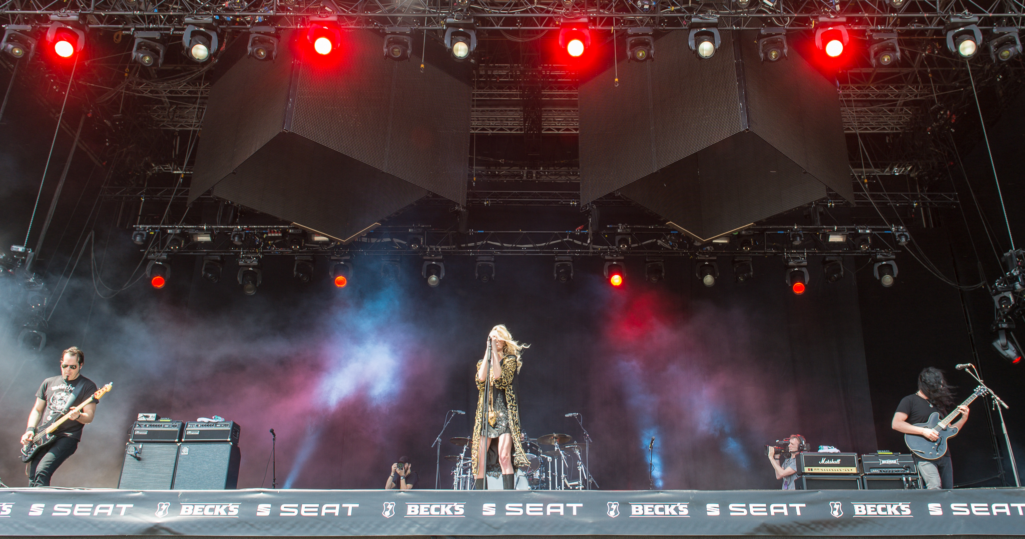 ARGO-Konzerte,Ben Philips,Centerstage,Konzert,Livekonzert,Livemusik,Mark Damon,Musik,RiP,Rock im Park 2014,Taylor Momsen,The Pretty Reckless